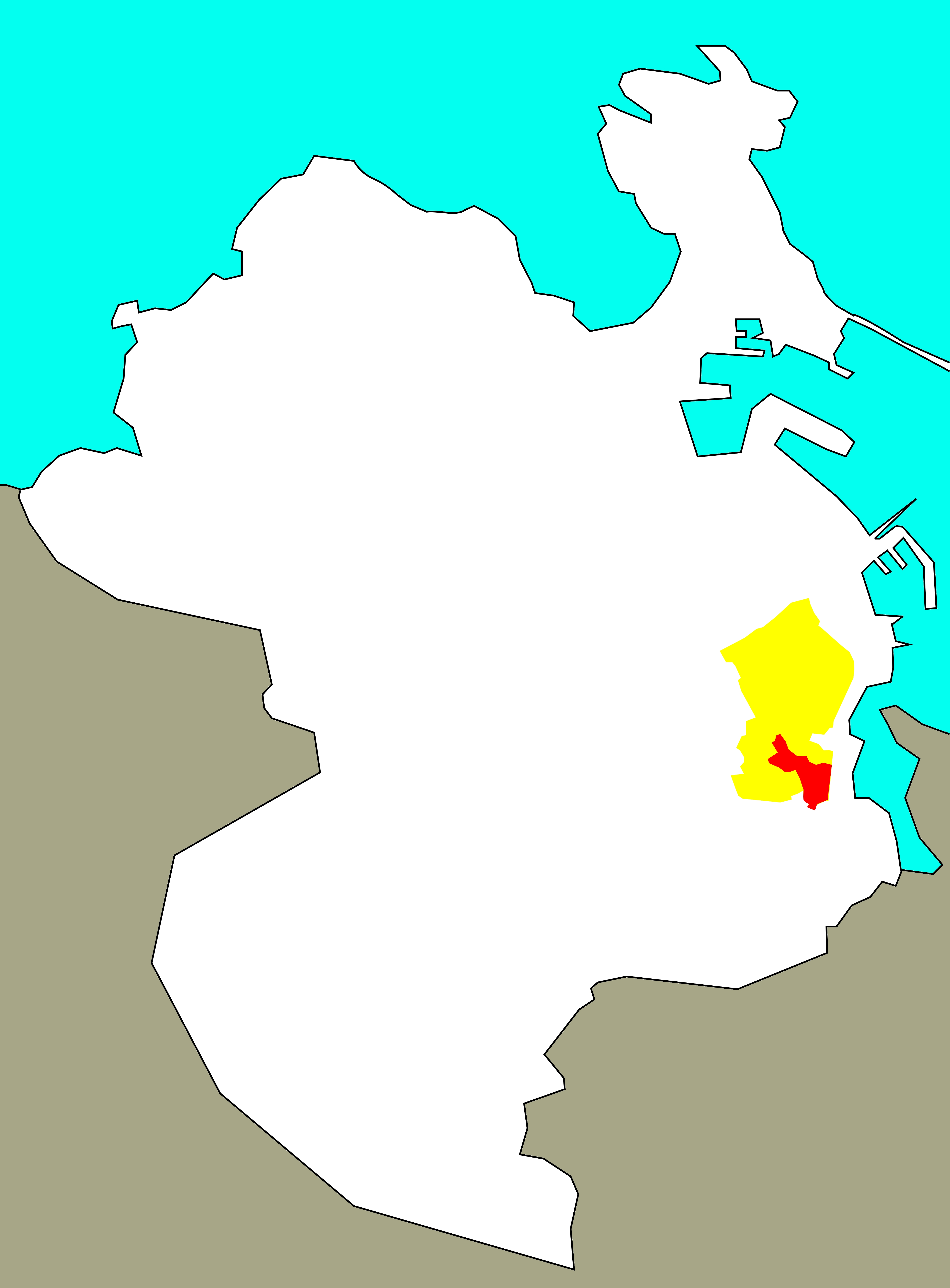 Situación de Monserrat no "barrio-territorio" de Eirís, segundo